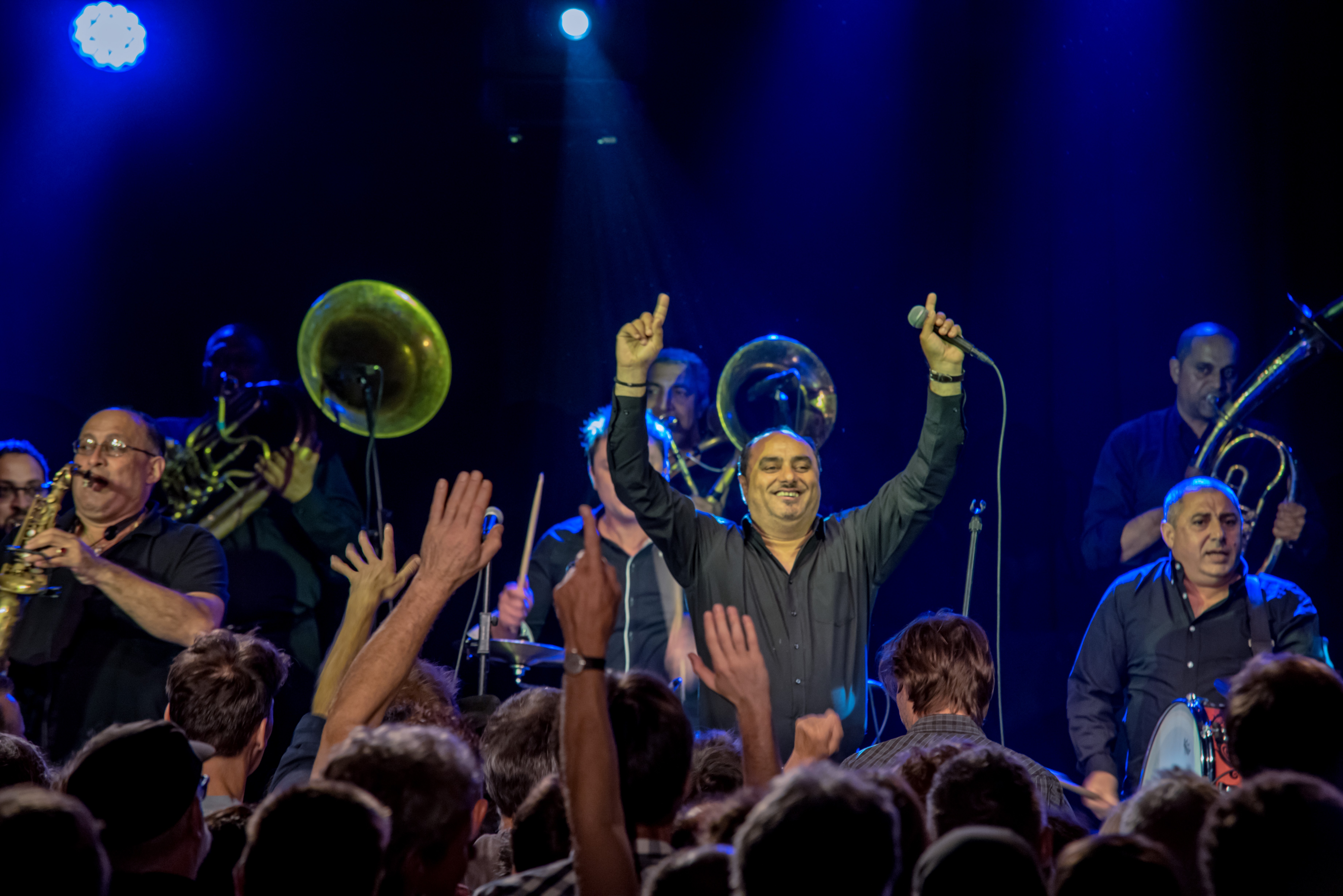 Bilder vom Zelt Musik Festival 2017 in Freiburg im Breisgau Fanfare Ciocarlia am 10.07.2017